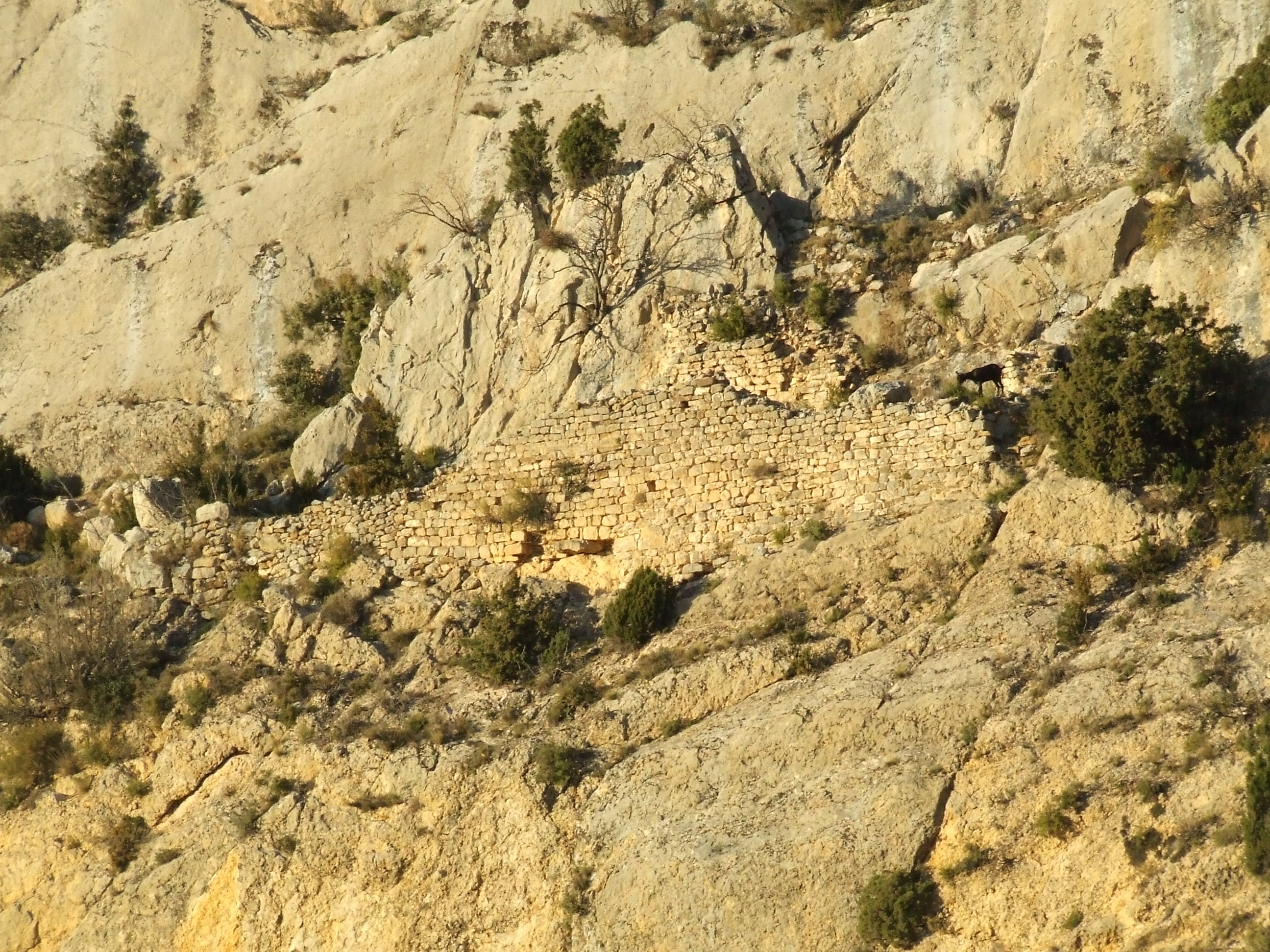 Detall de Santa Cauberola (Abella de la Conca, Pallars Jussà)